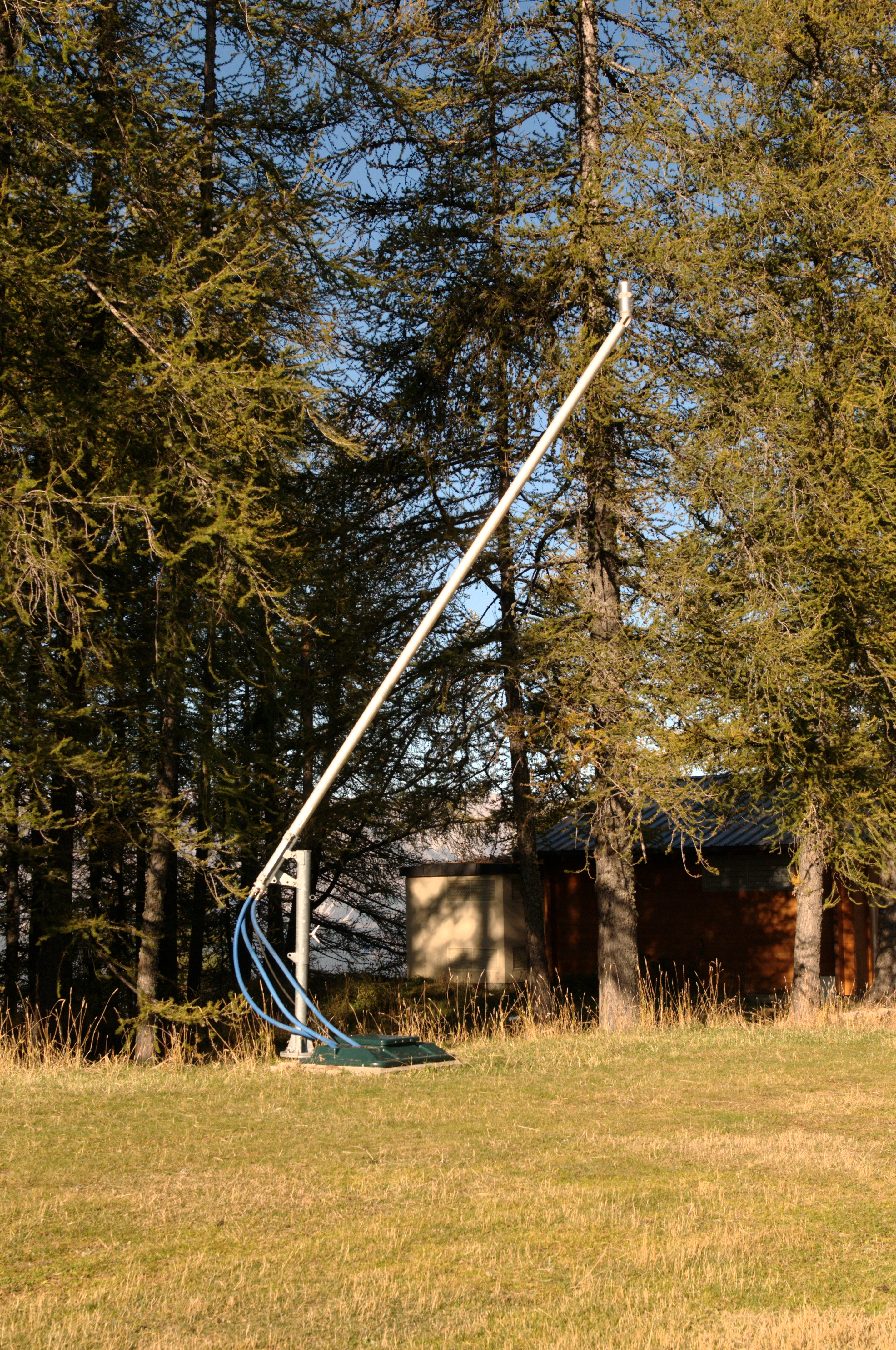 Canon à neige en automne à Valberg